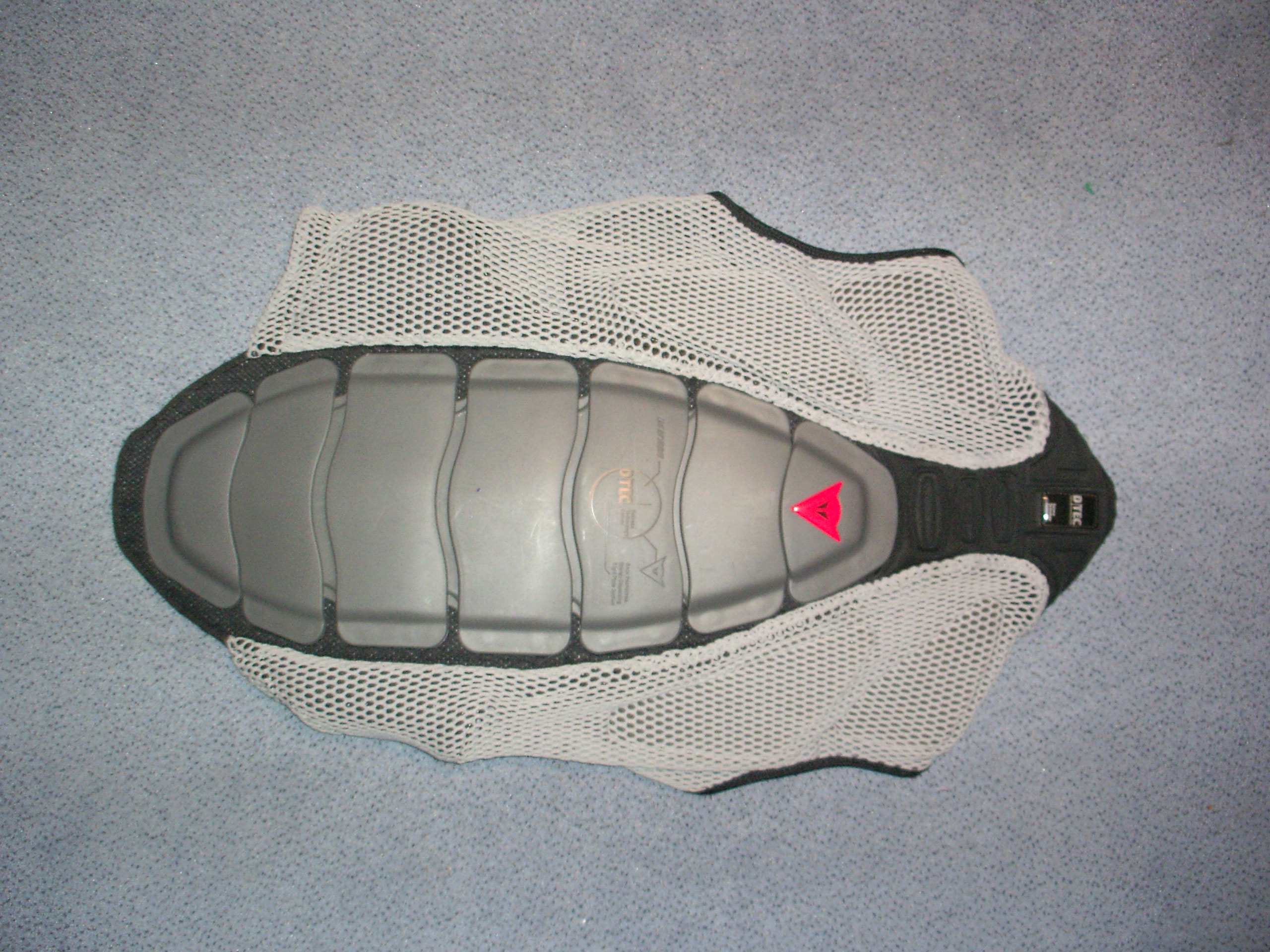 Snowboardweste mit Rückenprotektor